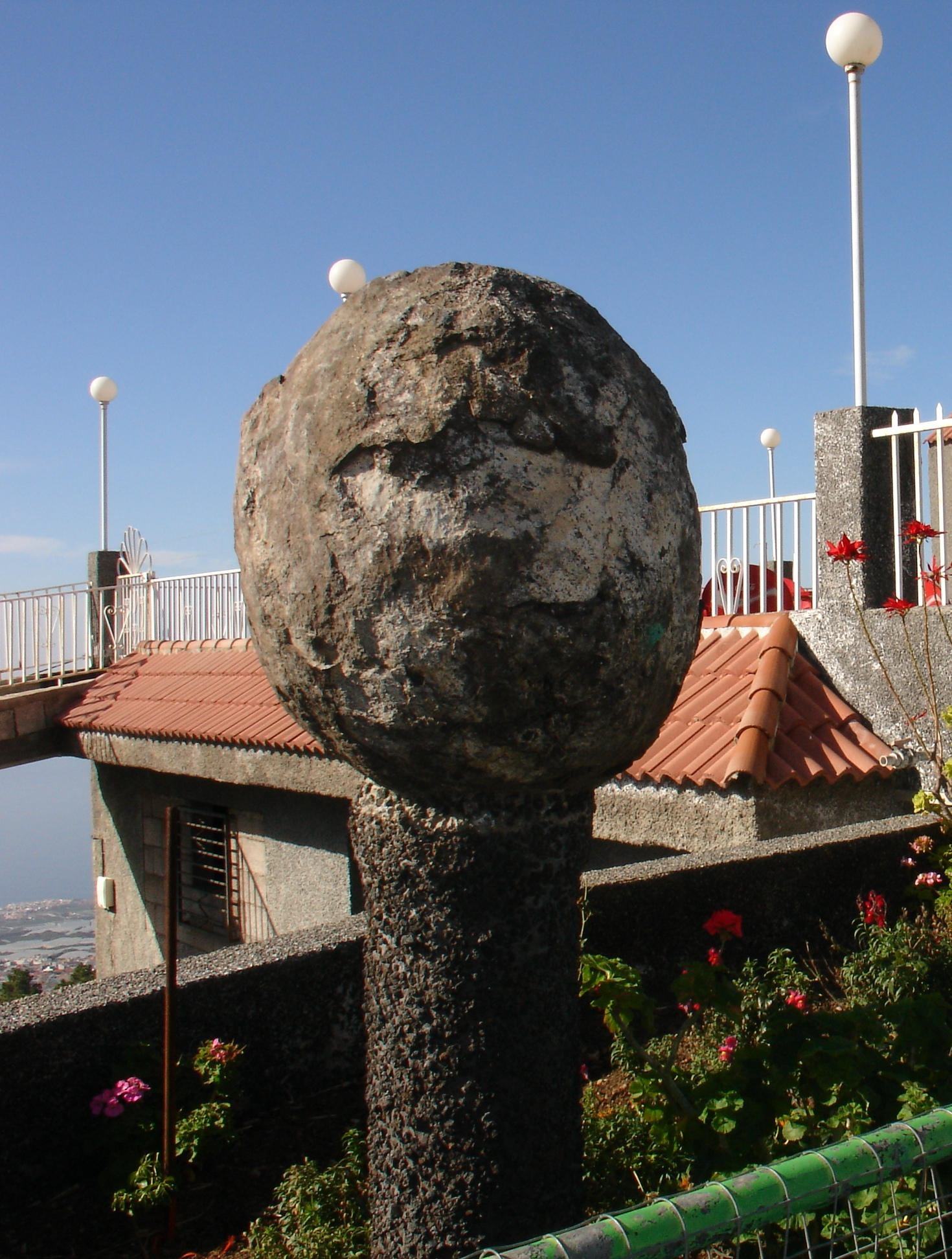 Ejemplo de Bomba Volcánica (Piroclastos de más de 64 mm) expuesta sobre pedestal en la subida al Teide, Isla de Tenerife, España, carretera C-823 desde Chio. Localización exacta Restaurante La Estrella, N 28°13'46,0" W 16°45'35,4", Altitud 1102 m.